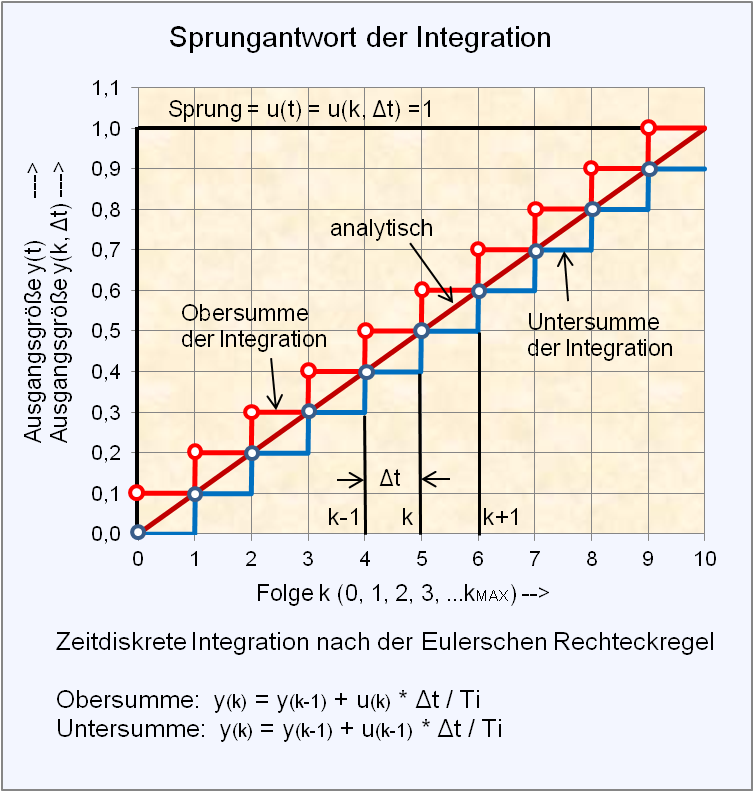 Grafische Darstellung der Obersumme und der Untersumme der numerischen Integration